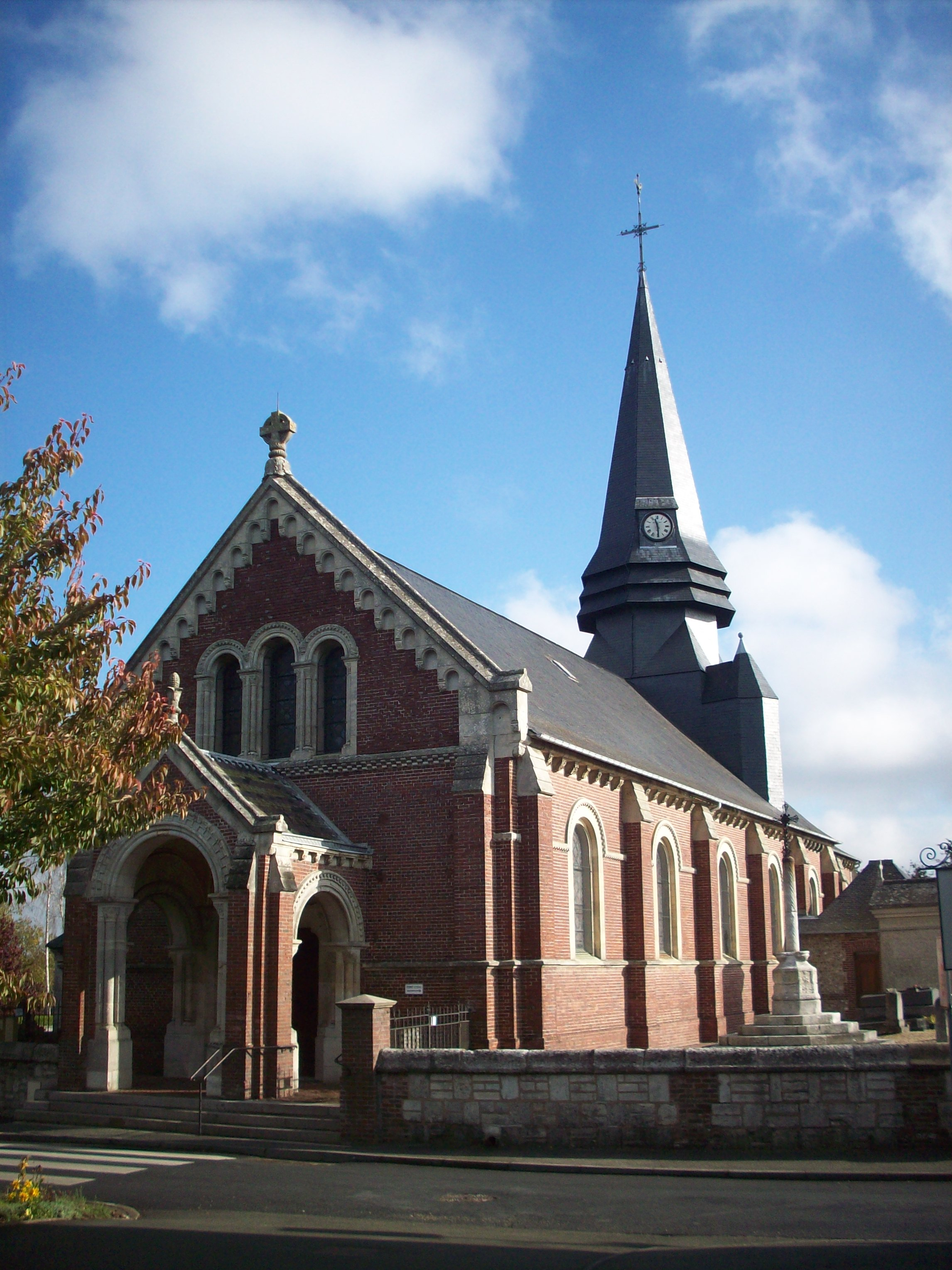 Eglise de Saint-Jean-du-Cardonnay.